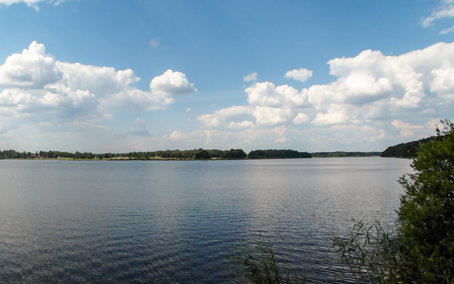 Lännasjön, Strängnäs kommun